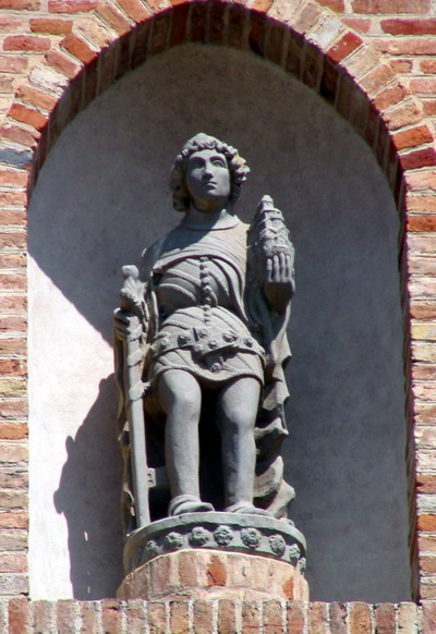 Asti, Colleggiata di San Secondo part.